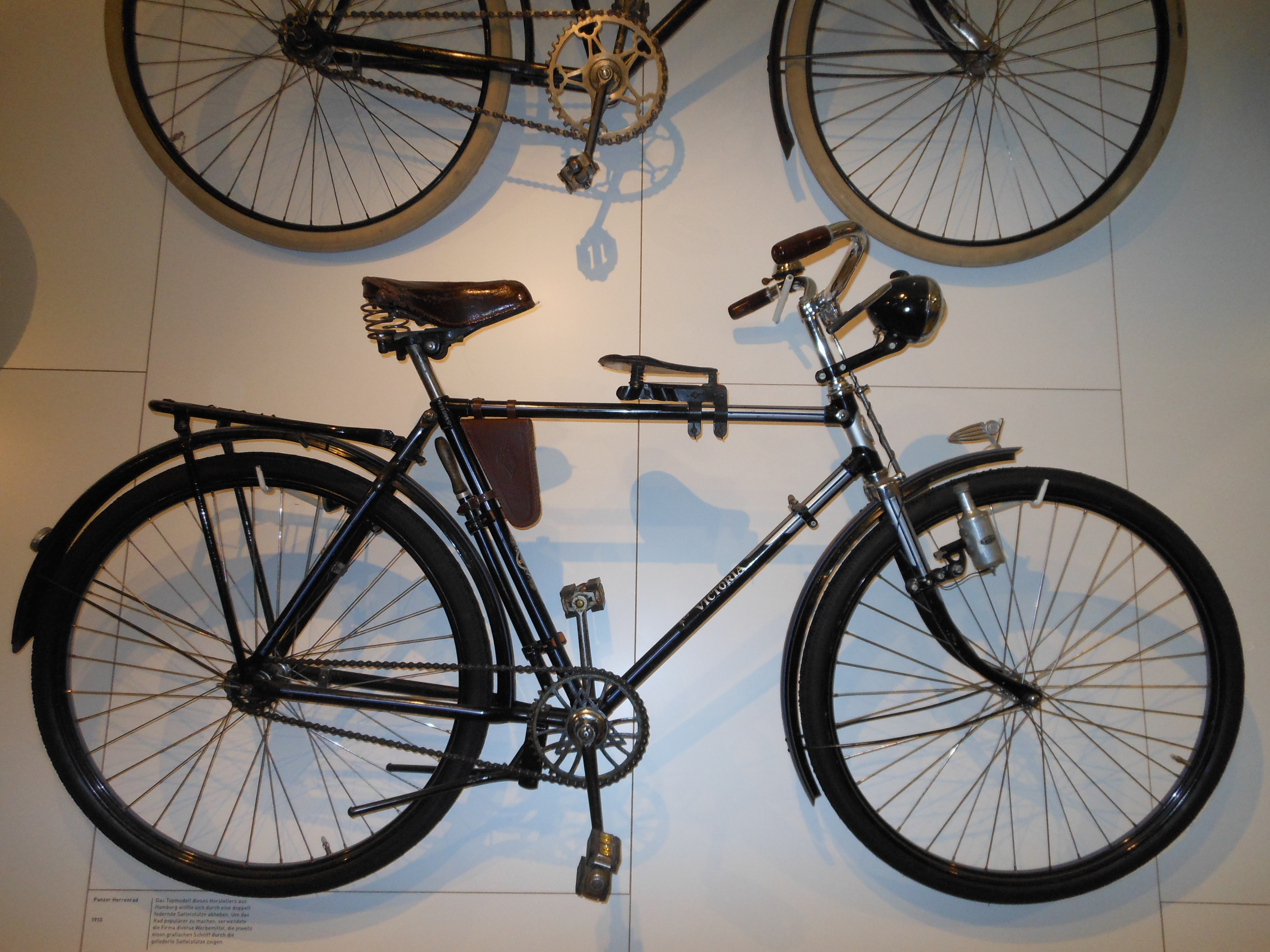 Zum 50-jährigen Bestehen der Firma im Jahr 1937 produziertes Herrenrad mit Kindersitz auf dem Oberrohr. Die Reflektoren an den Pedalen waren in Deutschland erstmalig.